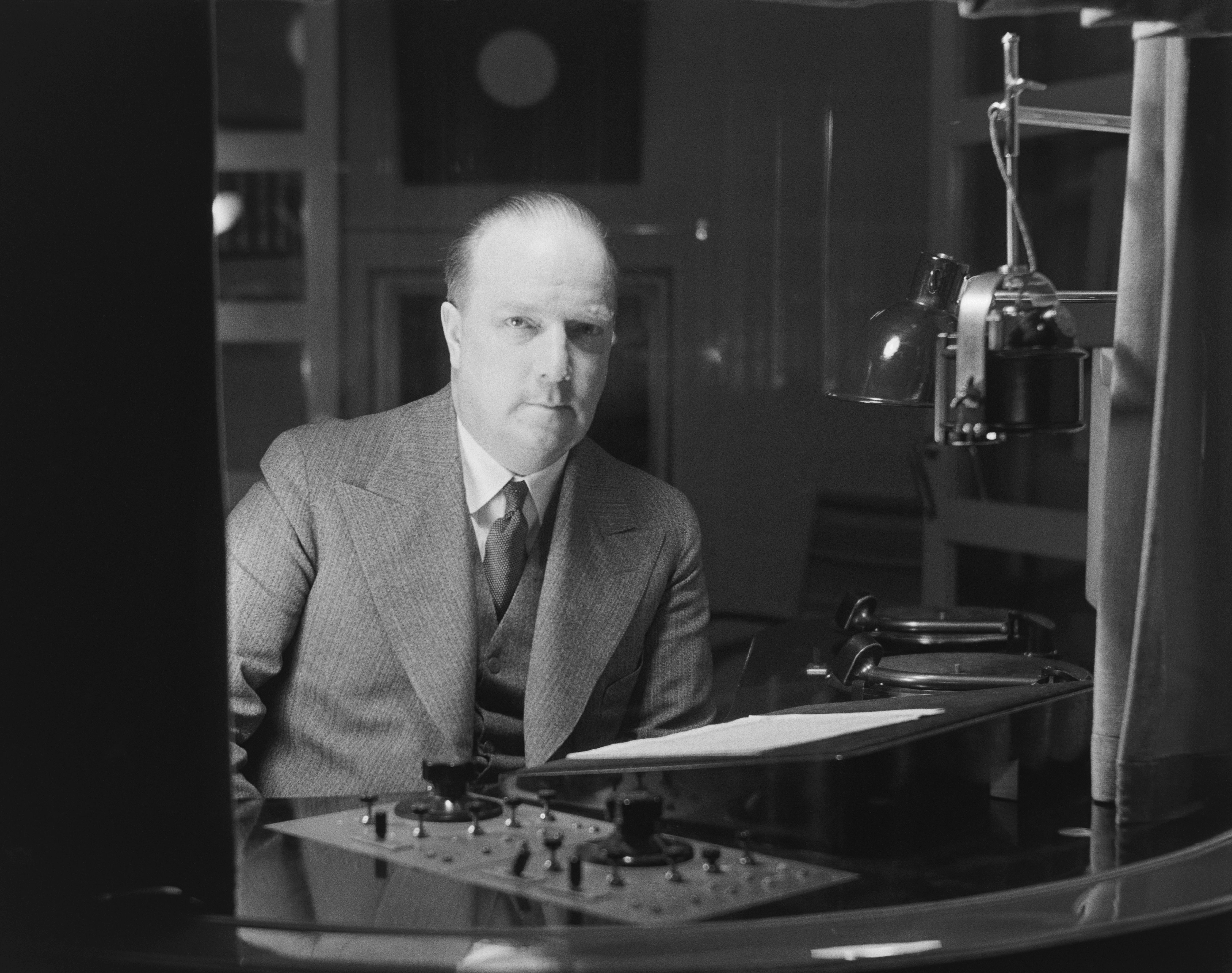 Toimittaja, radiokuuluttaja Markus Rautio kuuluttamon pöydän ääressä radion studiossa (kuuluttaja 1.12.1926-31.12.1956). Kuvausaika arvioitu vuoden tarkkuudella. Tiedätkö jotain tästä kuvasta? Jätä kommentti tai ota yhteyttä sähköpostitse: Tutustu Ylen arkistosisältöihin: Fler skatter från Yles arkiv: More about Yle, the Finnish Broadcasting Company